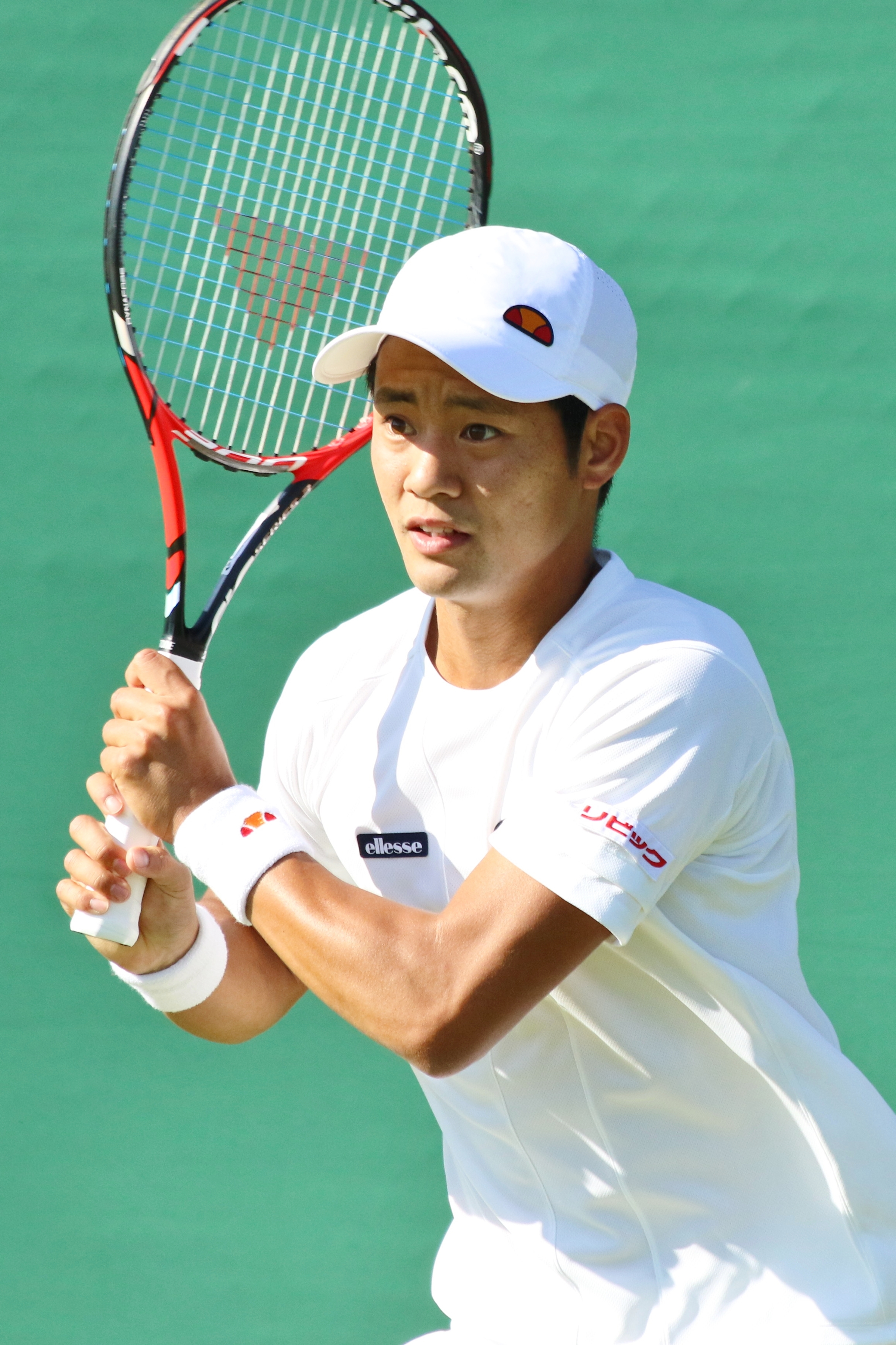 Moriya WMQ16 (18)